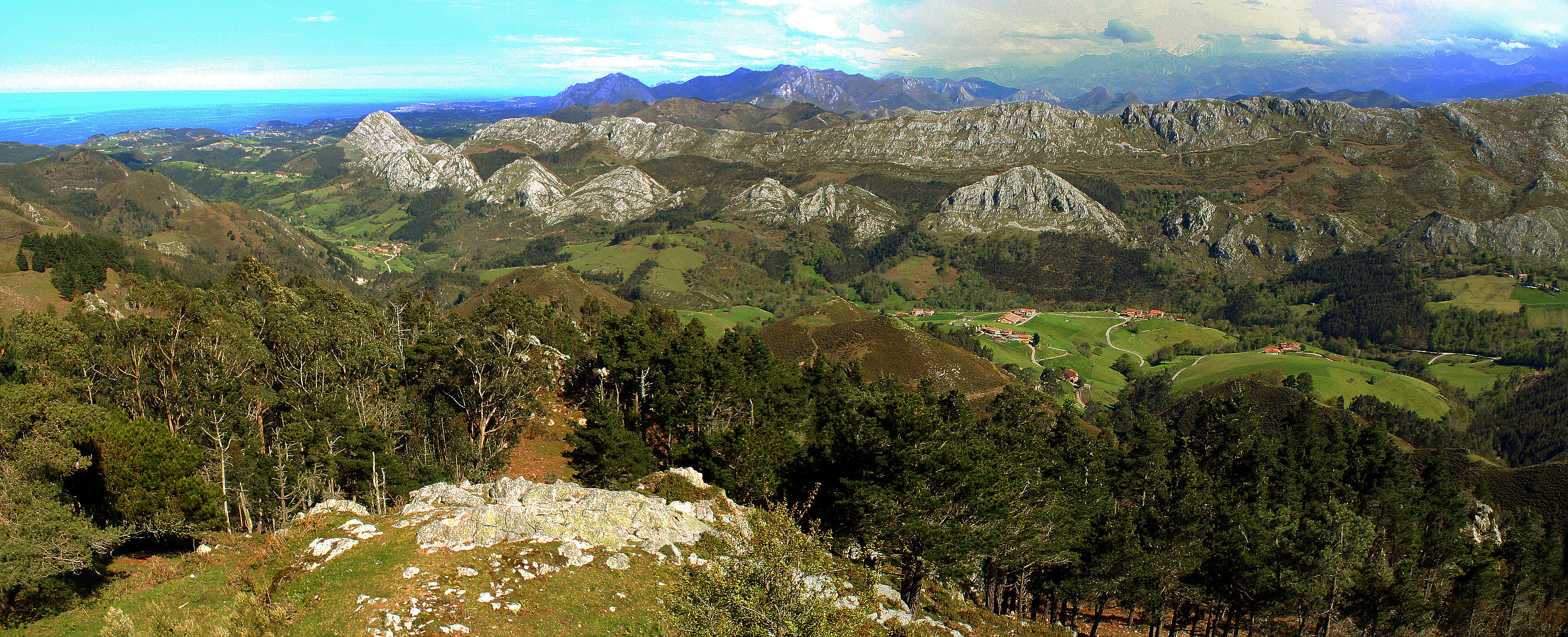 Panorámica de cabalgamientos en Asturias, desde el mirador de El Fito.